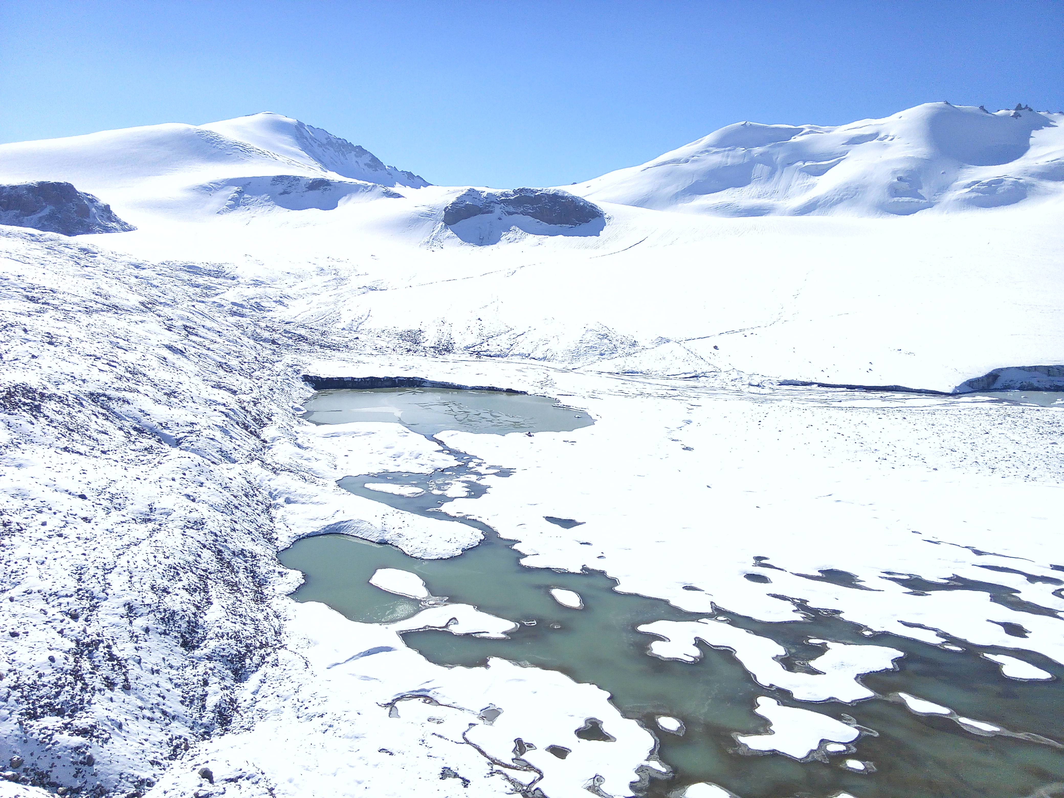 Ледник Макаревича, 2018 год